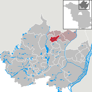 Schenkenberg in Brandenburg (Country) - District Uckermark